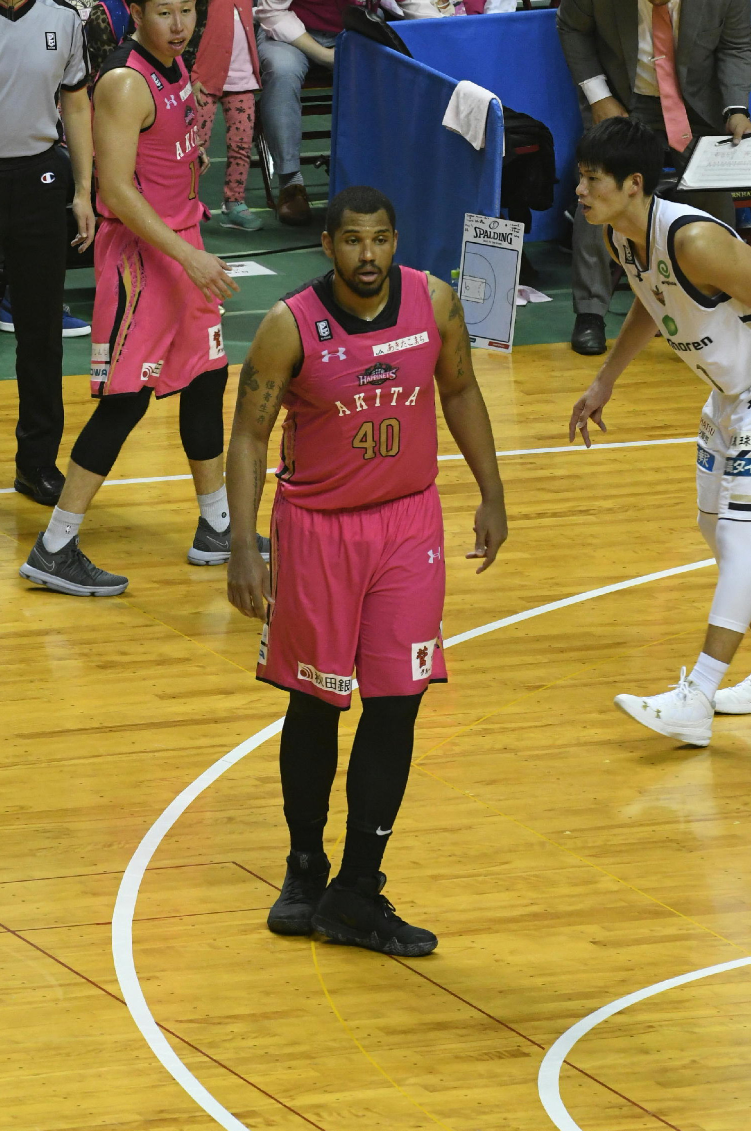 san martin corrientes campeon super 20 2